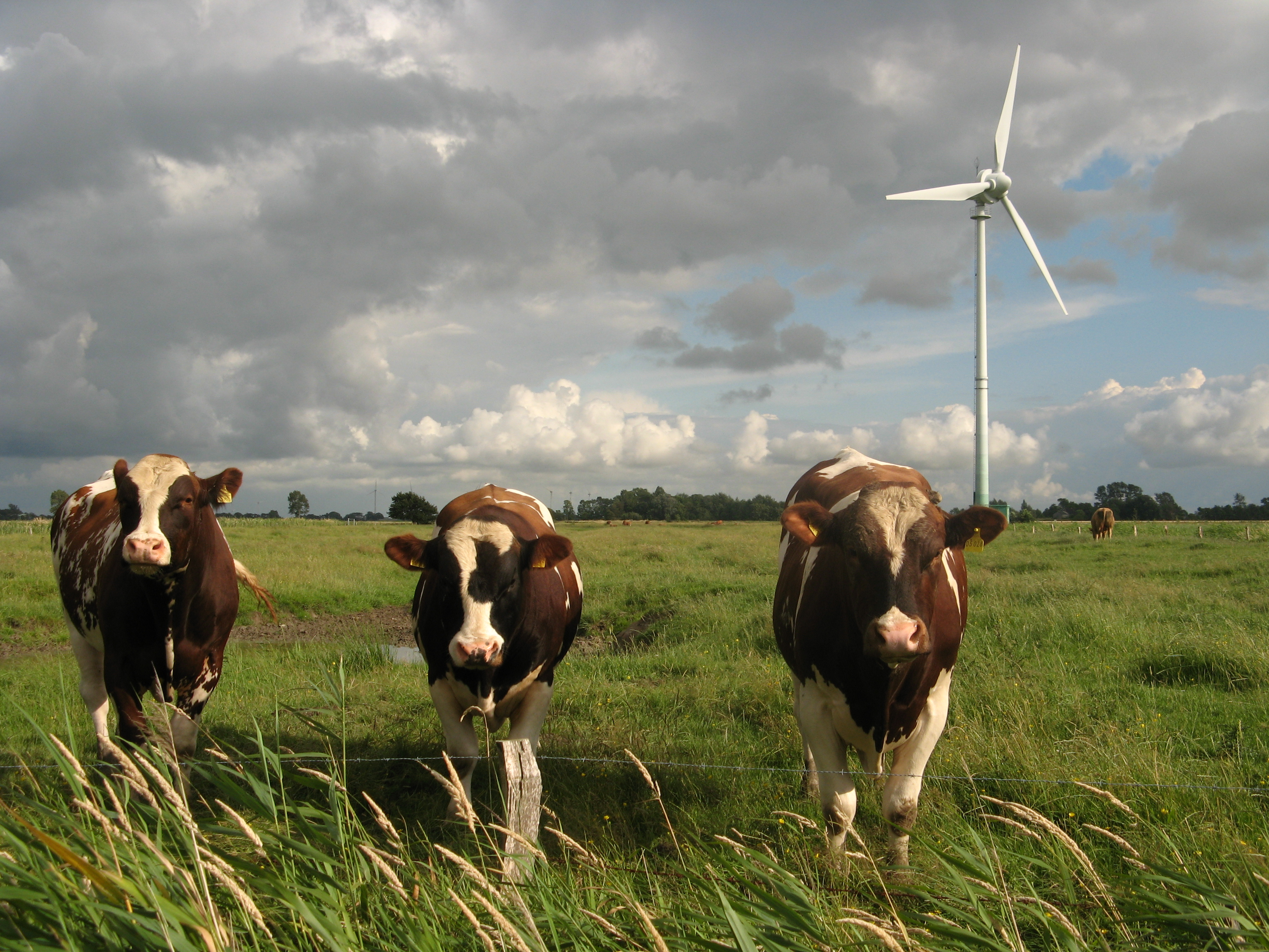 Landestypische Tier in Wesselburener Deichhausen